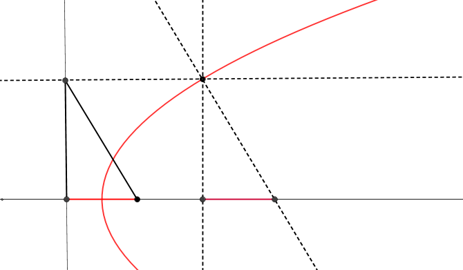 illustration geogebra de le sous normale d'une parabole